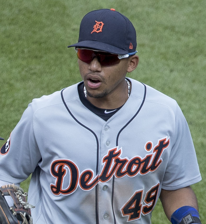 Tigers at Orioles 8/6/17